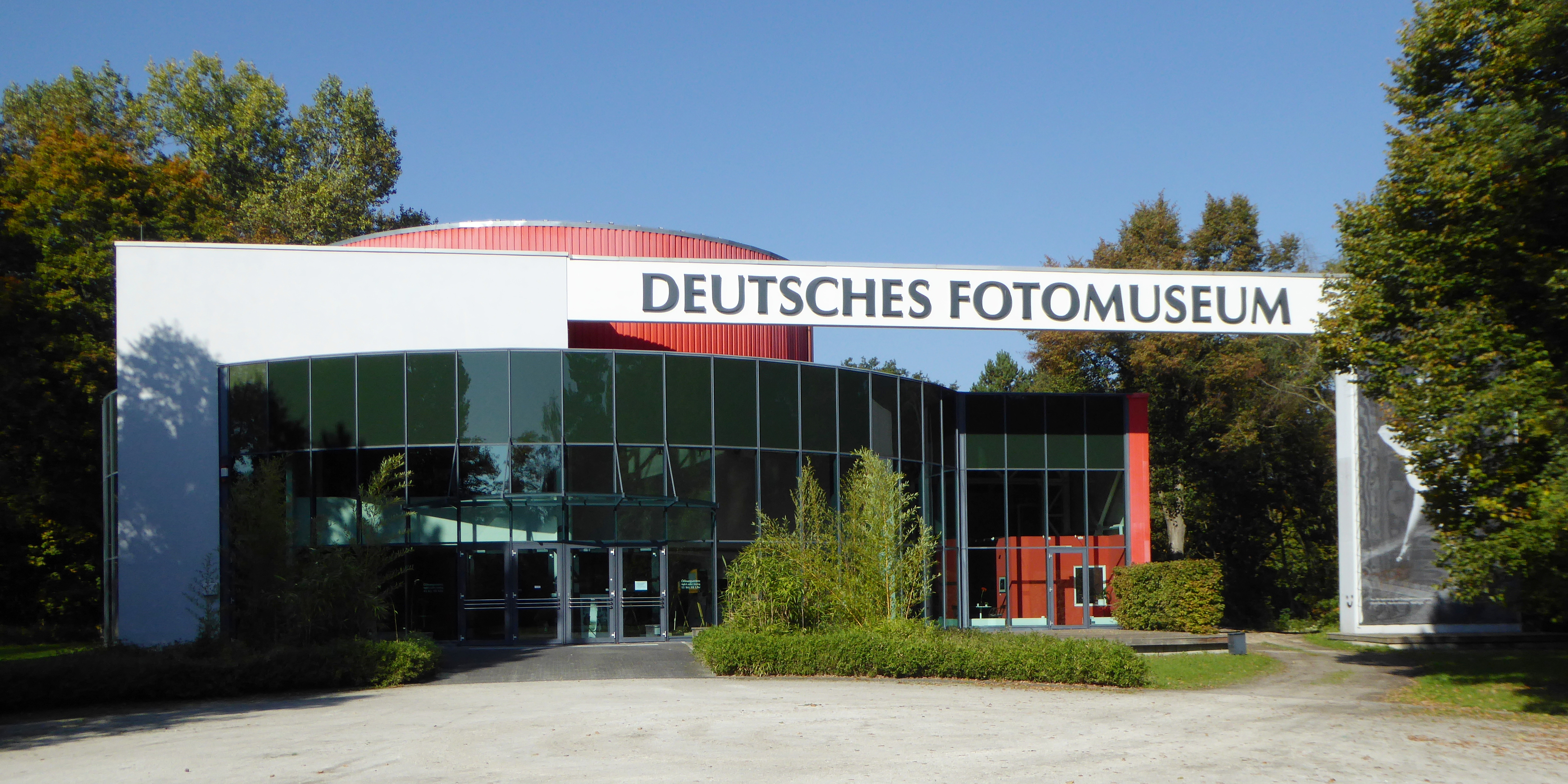 Das Deutsche Fotomuseum in Markkleeberg im Landkreis Leipzig.